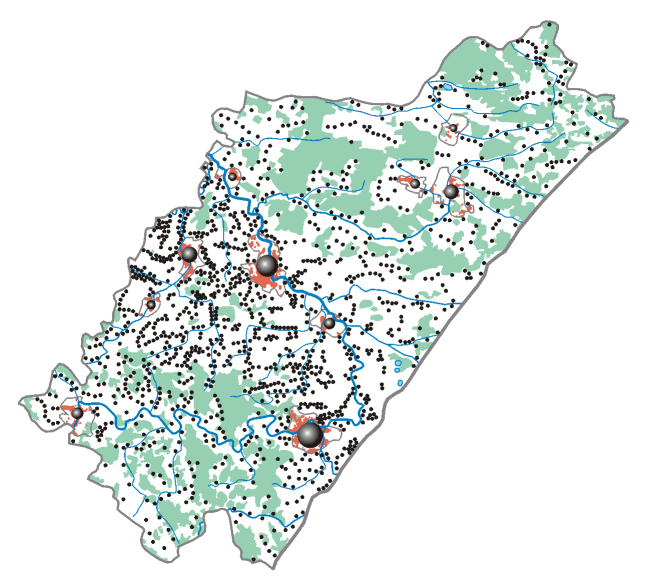 Mapa ludności województwa przemyskiego (ludność wiejska - metoda kropkowa, ludność miejska - metoda kartodiagramu). Stan na 31.12.1994